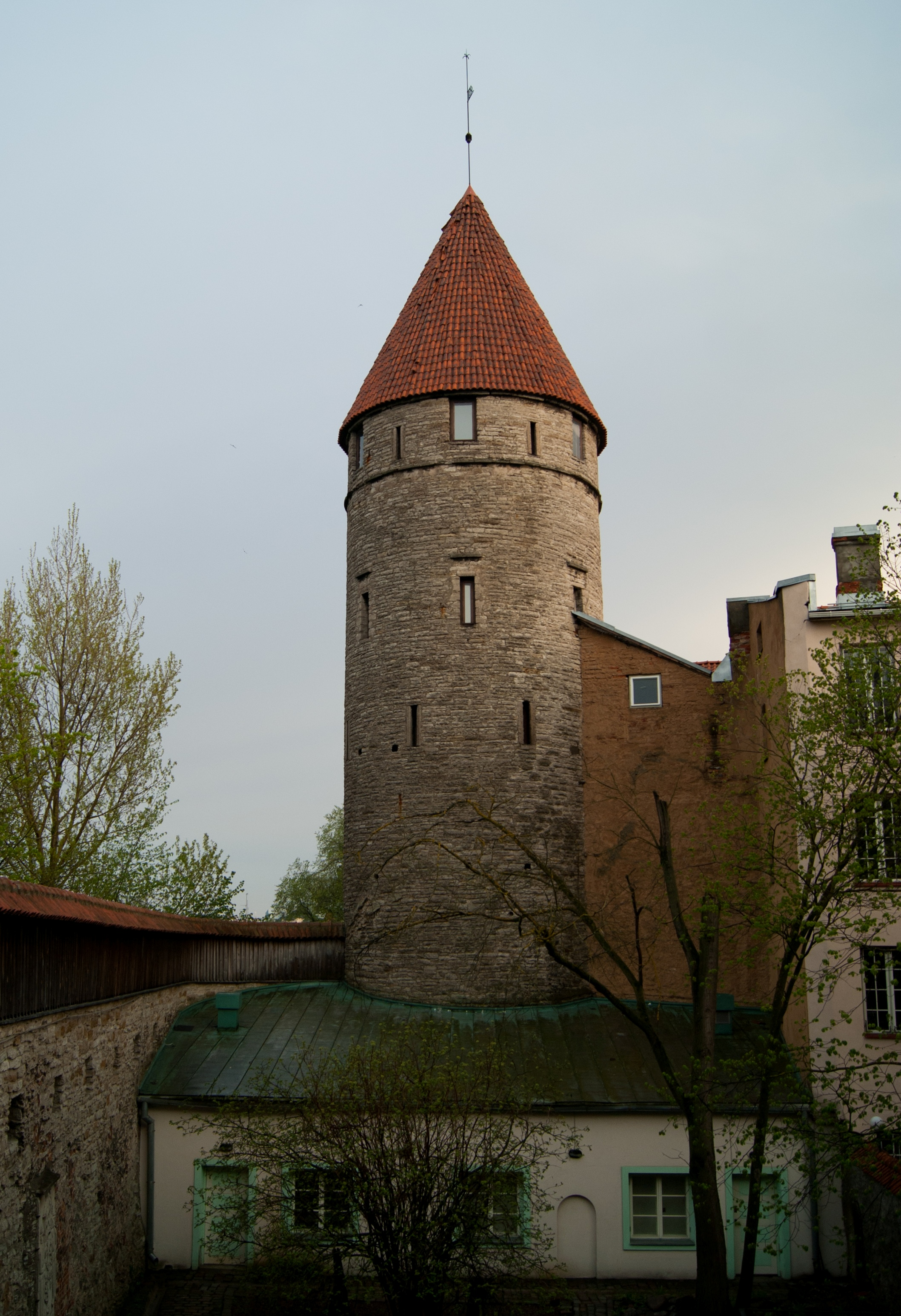 Stoltingi torn